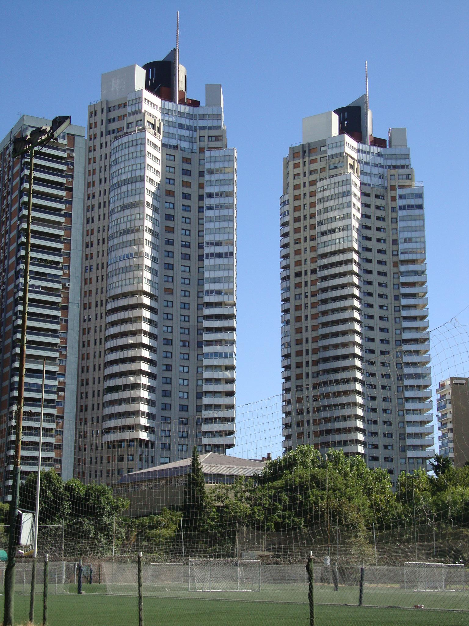 Torres Alto Palermo Plaza. Se encuentran entre las calles Juncal, Jerónimo Salguero y Bulnes. Poseen 133 metros de altura. Buenos Aires, Argentina.